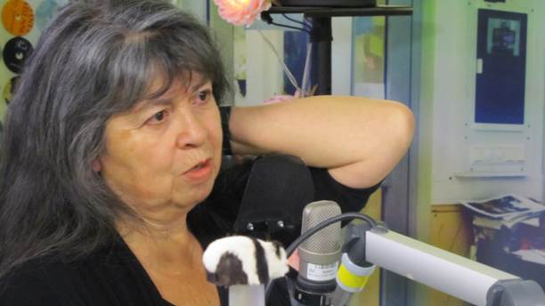 Paulina de los Reyes talar om militärdiktaturen i Chile i Morgonpasset i P3 år 2014.